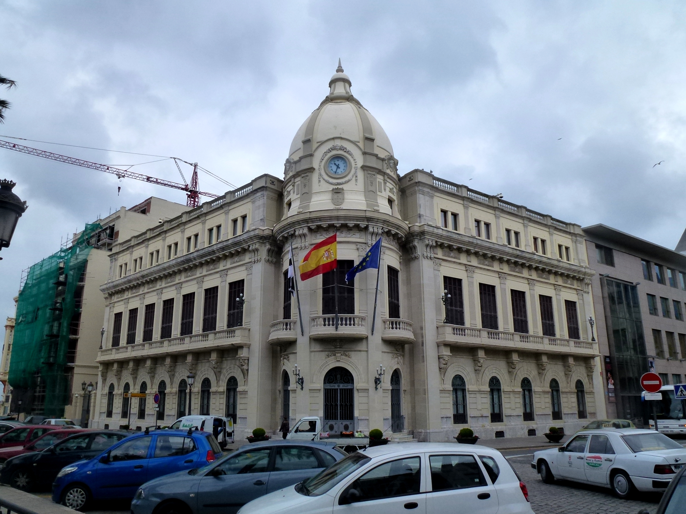 Ayuntamiento Plaza de Africa Ceuta